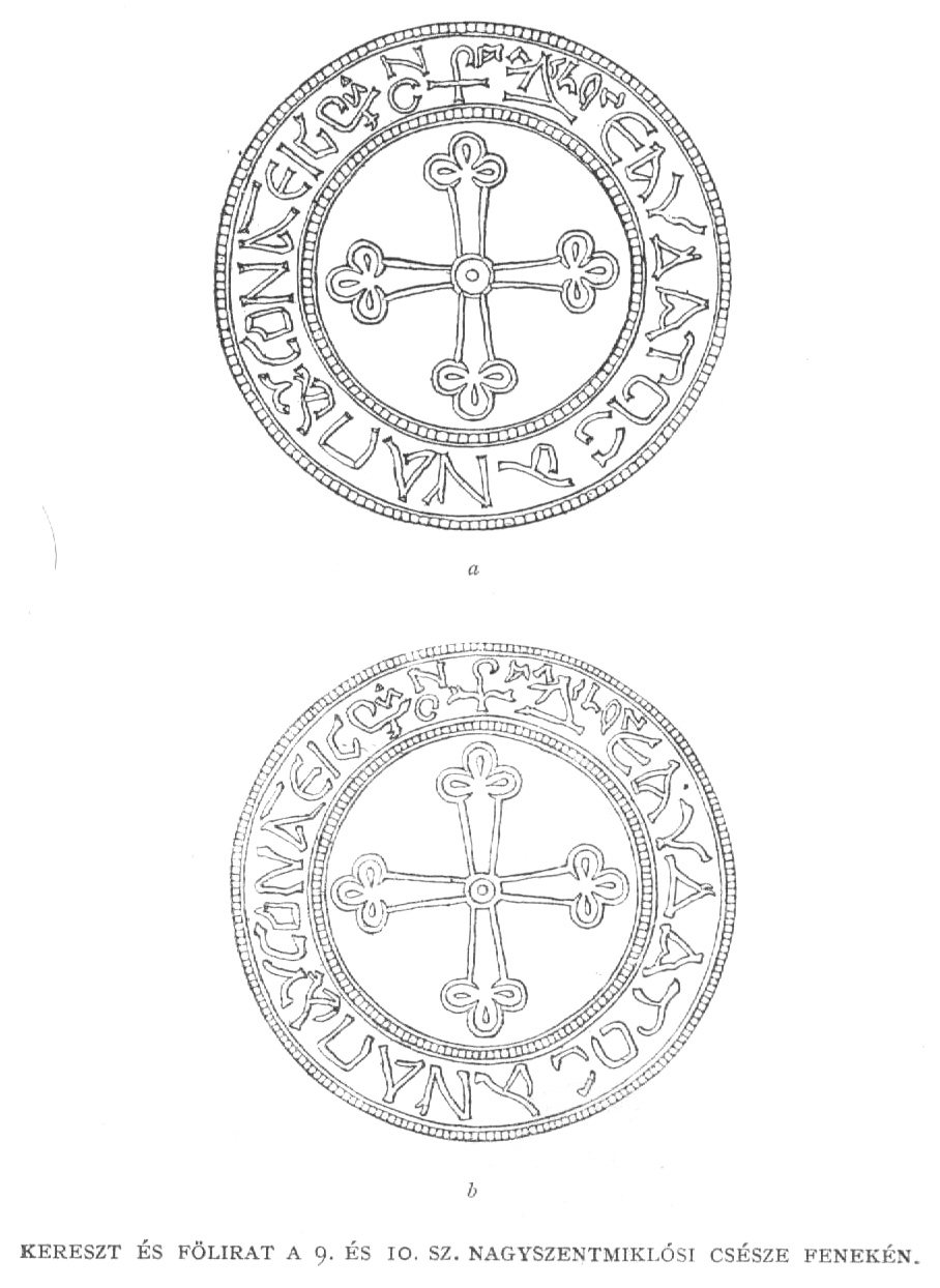 a 9. és 10. számú lapos csészék görög feliratai a Nagyszentmiklósi kincsből